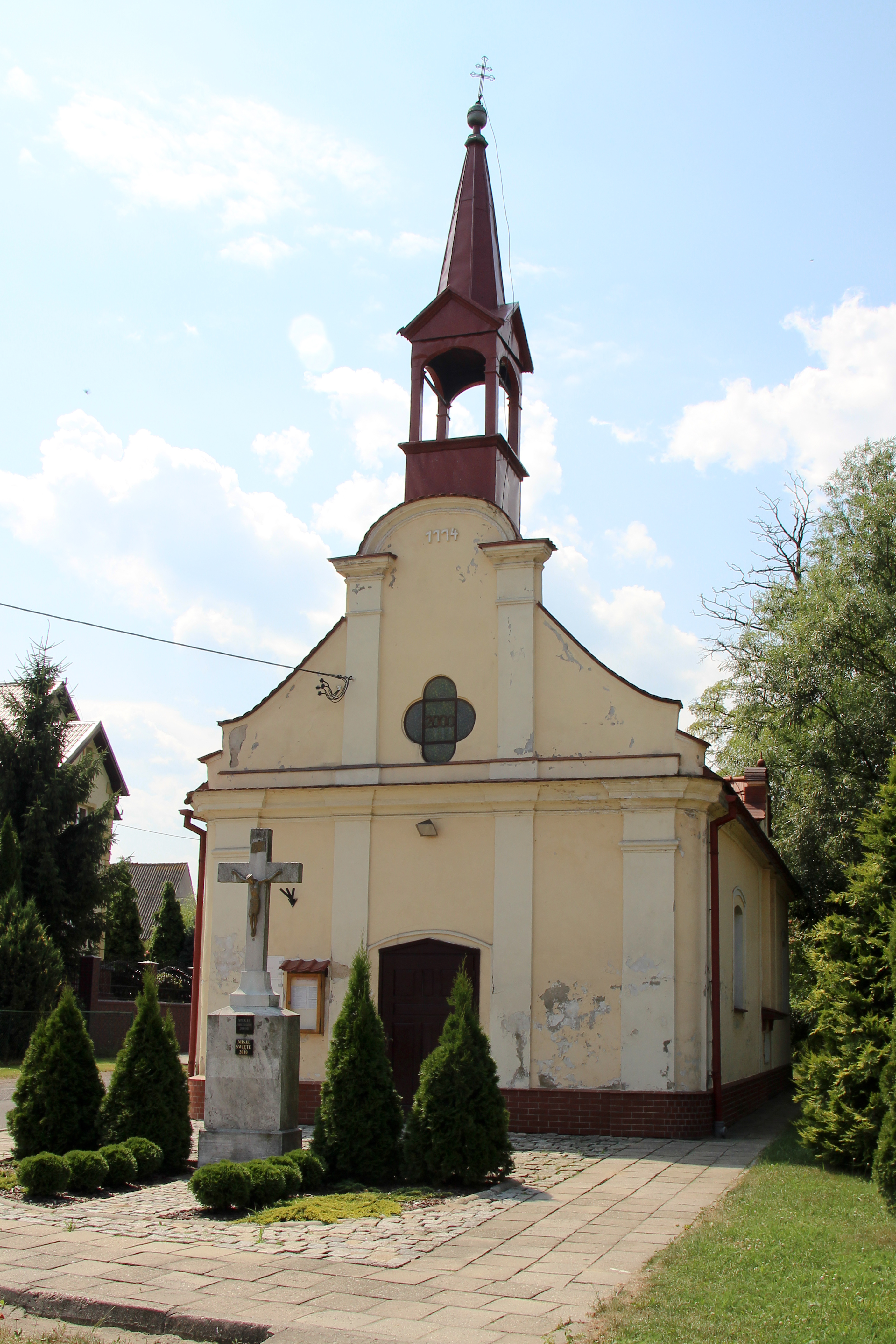 Unikowice – kaplica Świętej Trójcy, 1774